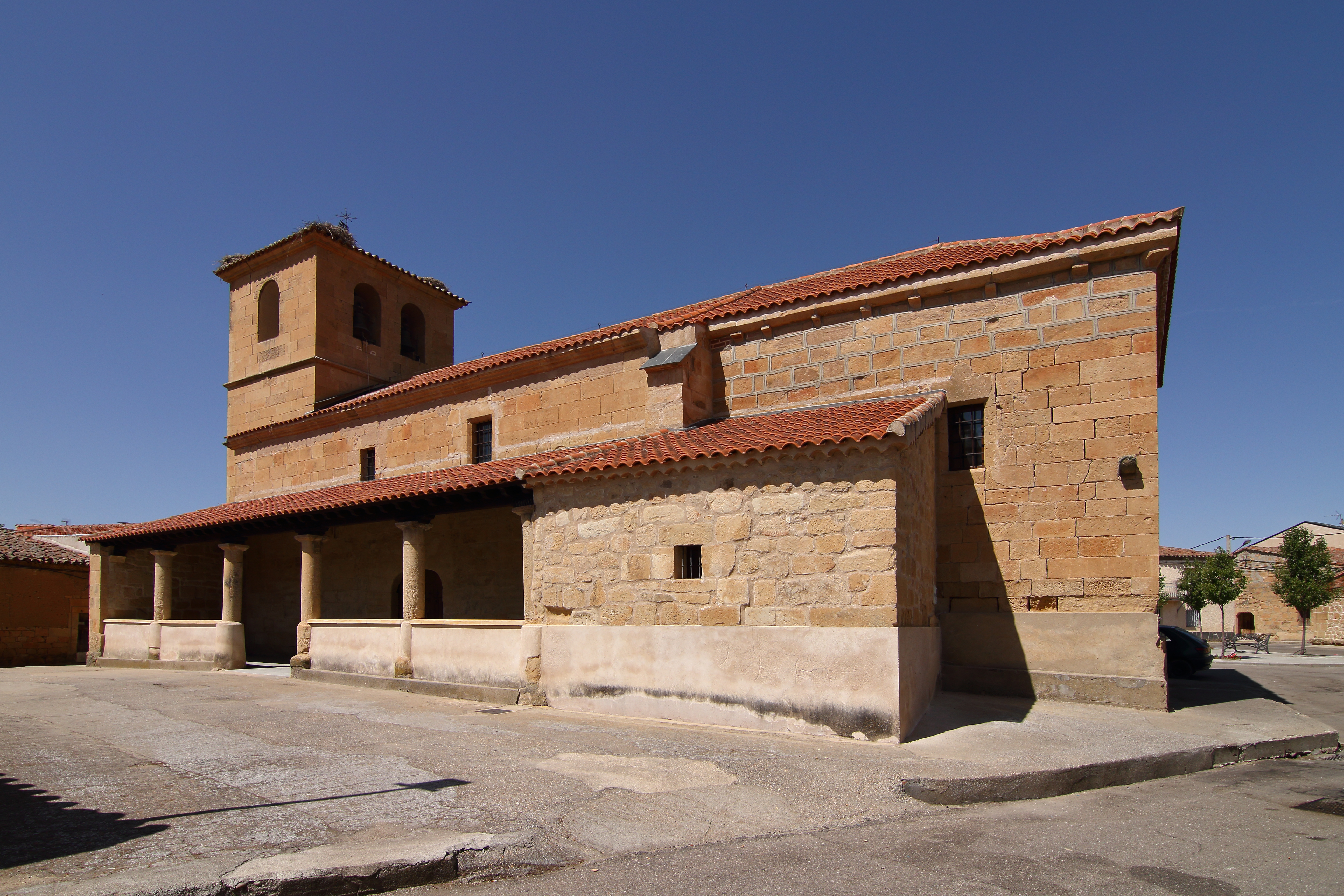 Iglesia de San Morales, vista 2